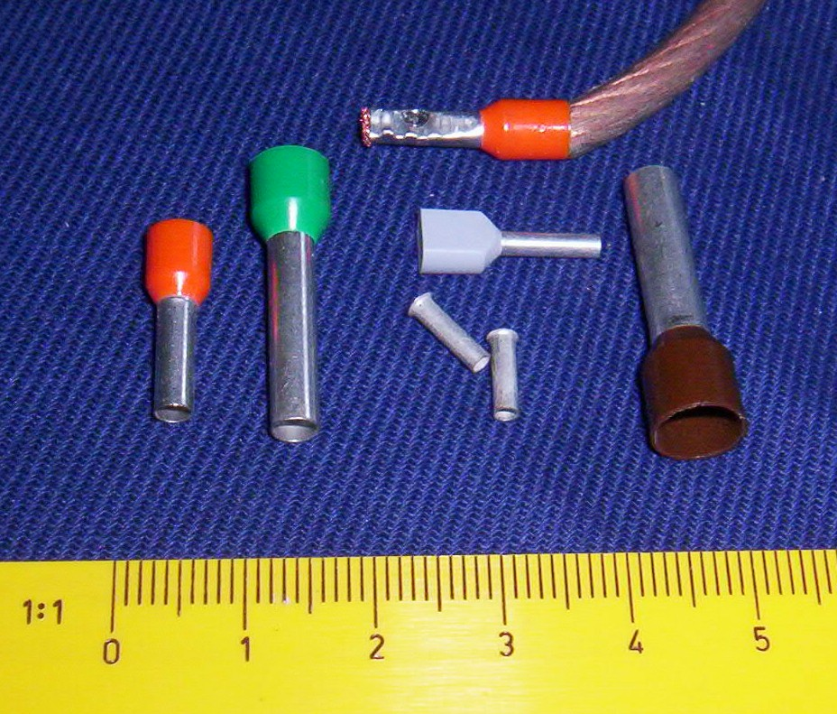 Versch. Aderendhülsen mit und ohne Schutzkragen